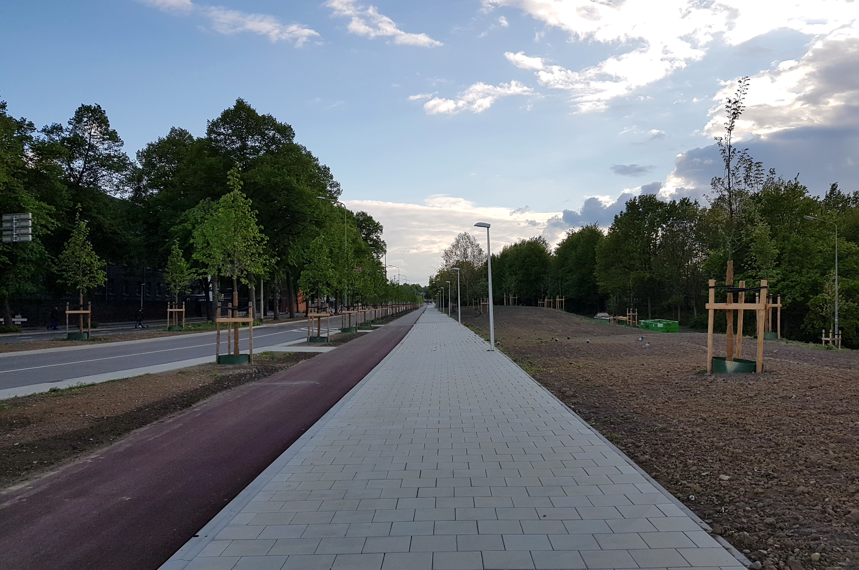 Zicht uit het noordoosten op de Frontensingel in Maastricht. De singelweg langs de voormalige stadsmuur van Maastricht werd in 2018-2019 opnieuw aangelegd nadat de aanlanding van de Noorderbrug er niet langer op aansloot, waardoor de straat veel minder verkeer te verwerken kreeg. Het voormalige wegdeel rechts is aan het Frontenpark toegevoegd.